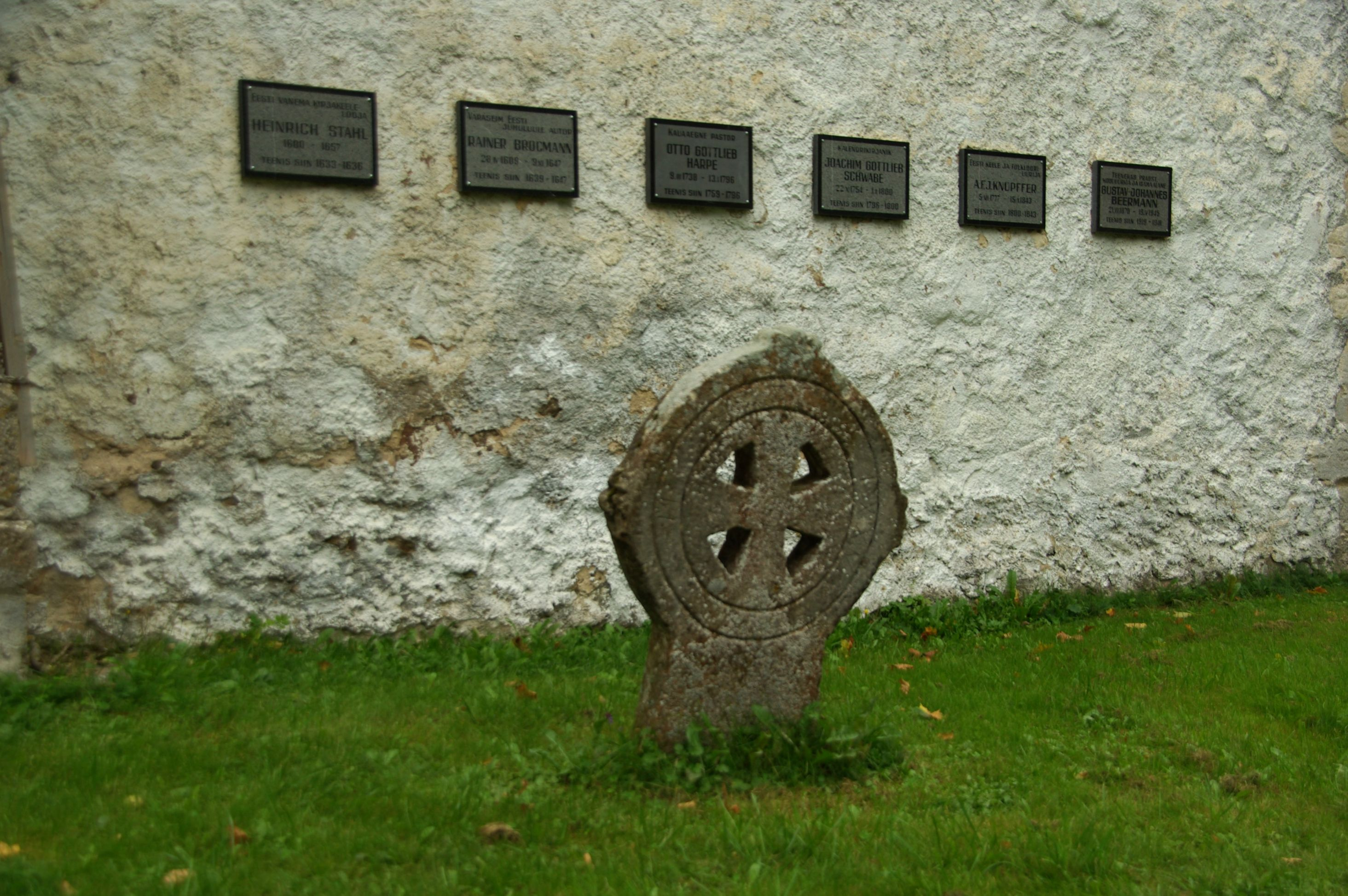 Lääne-Viru maakond, Kadrina vald, EELK Kadrina kirik